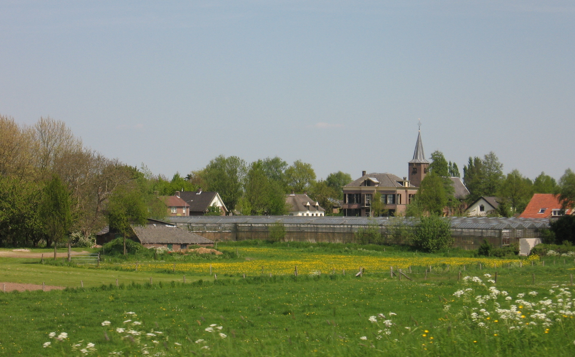 Tuil